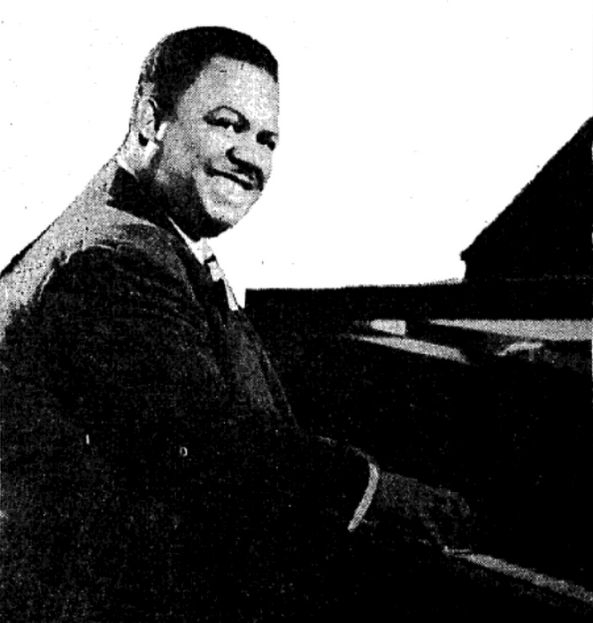 Meade Lux Lewis